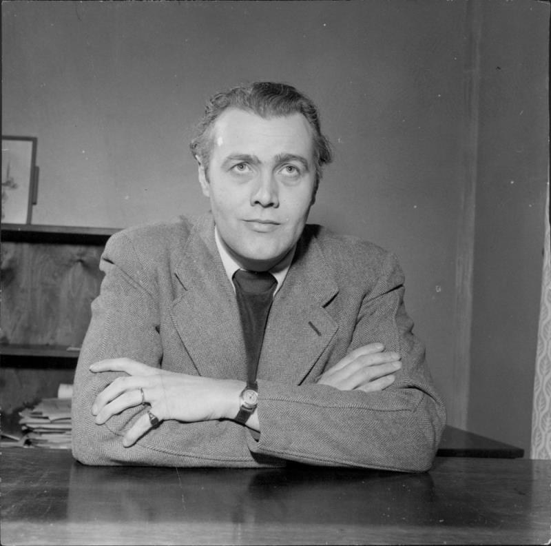 Foto på Bertil Perrolf infört i bl.a. Året Runt 1955:14.